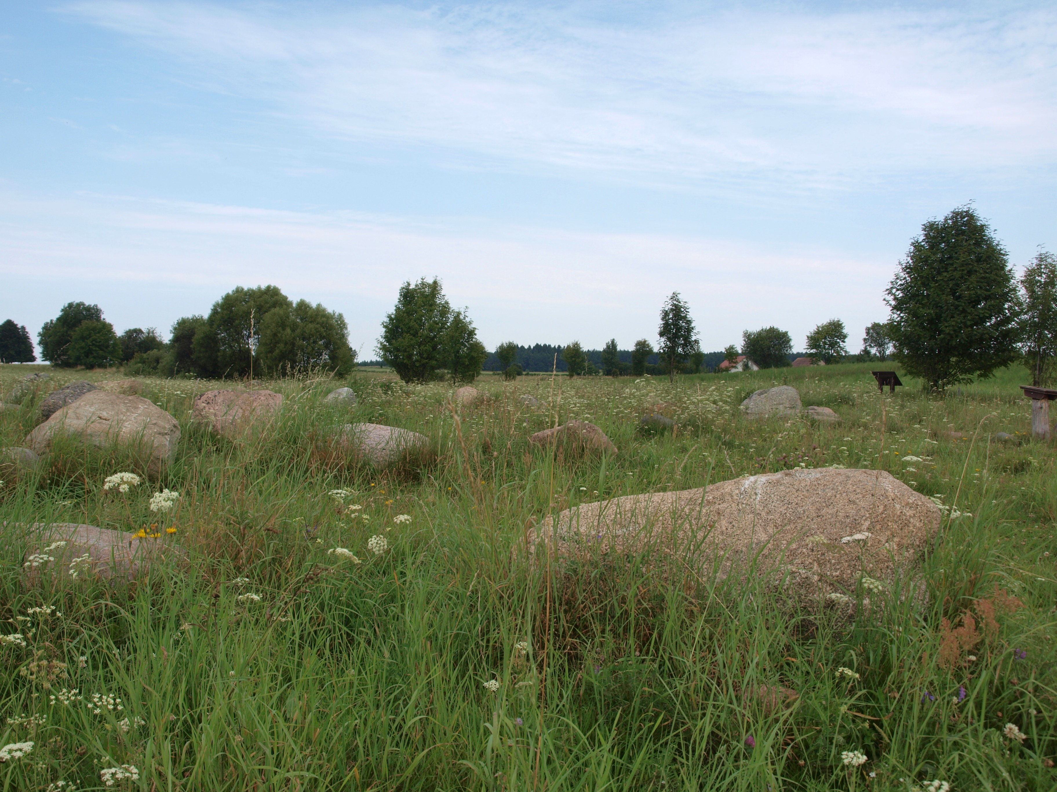 Rezerwat przyrody Rutka (Głazowisko Rutka) w Suwalskim Parku Krajobrazowym.